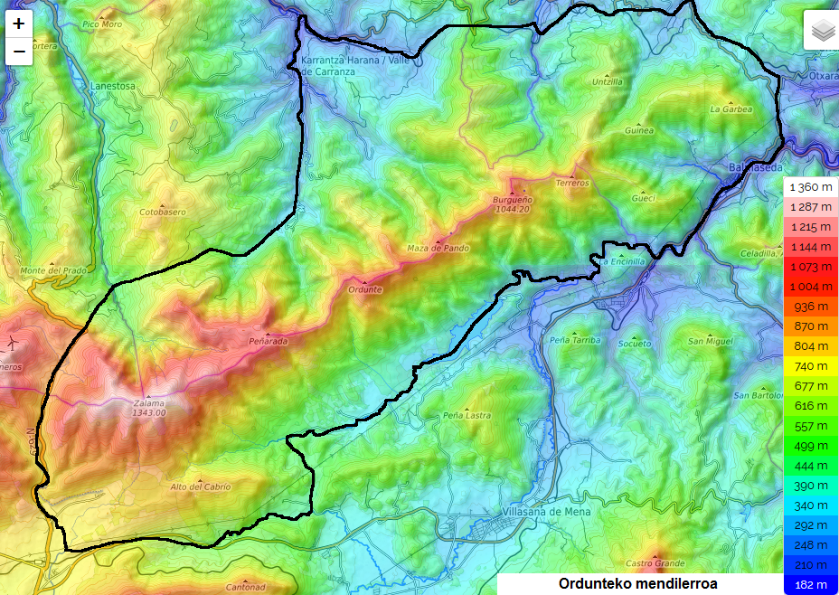 Ordunteko mendilerroaren mapa topografikoa.